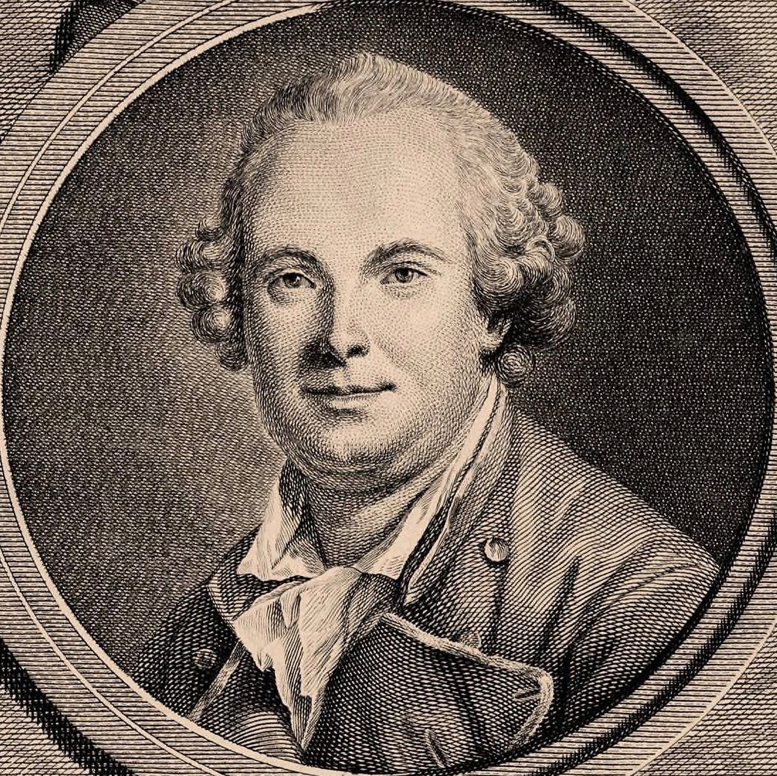 Simon-Charles Miger (1736–1824) nach Guillaume Voiriot (1713–1799): Porträt des Tenors Joseph Caillot (1733–1816). Bibliothèque Nationale de France. Ausschnitt.